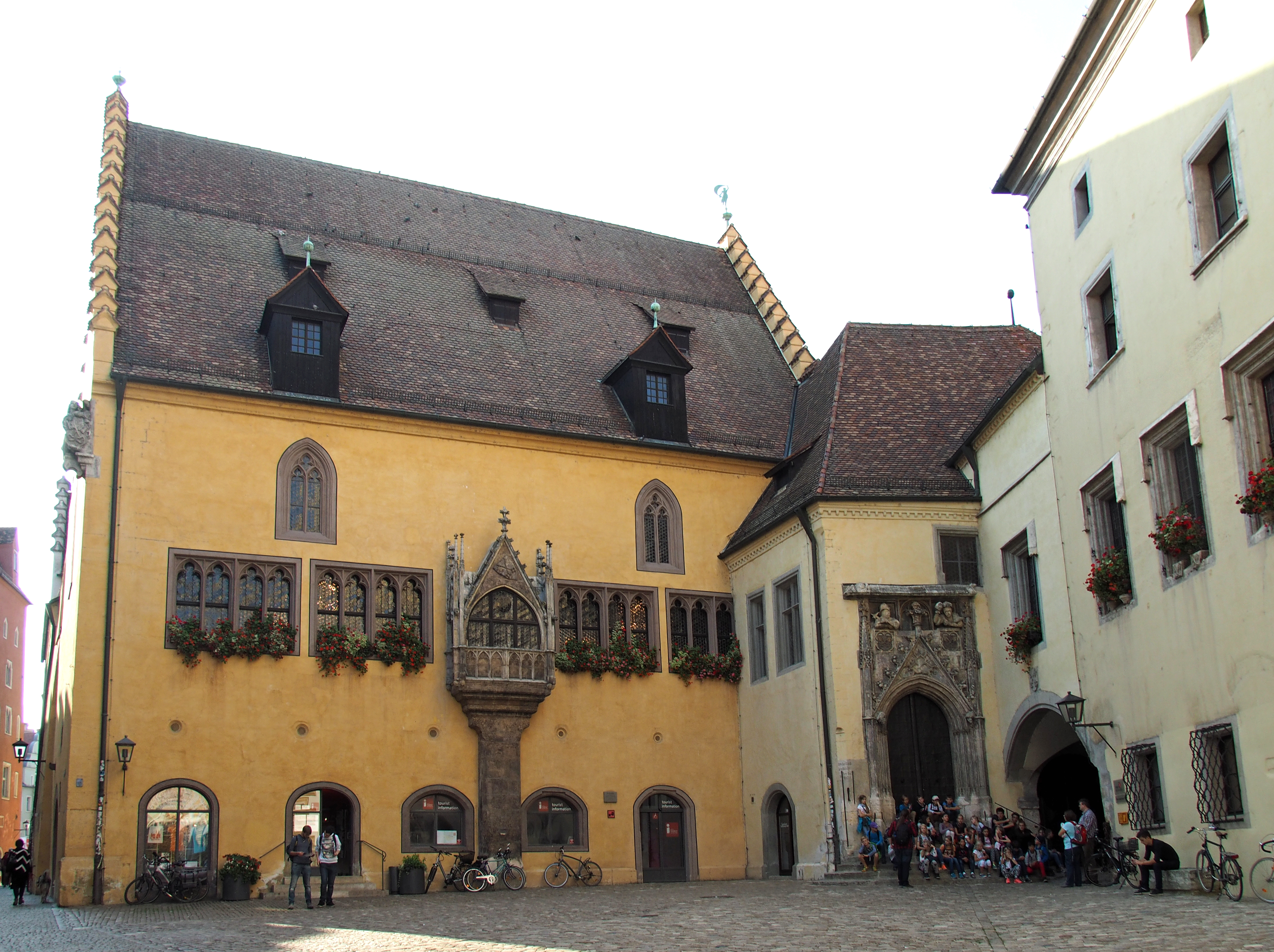 Altes Rathaus in Regensburg, links im ersten Stock mit Erker der Reichssaal